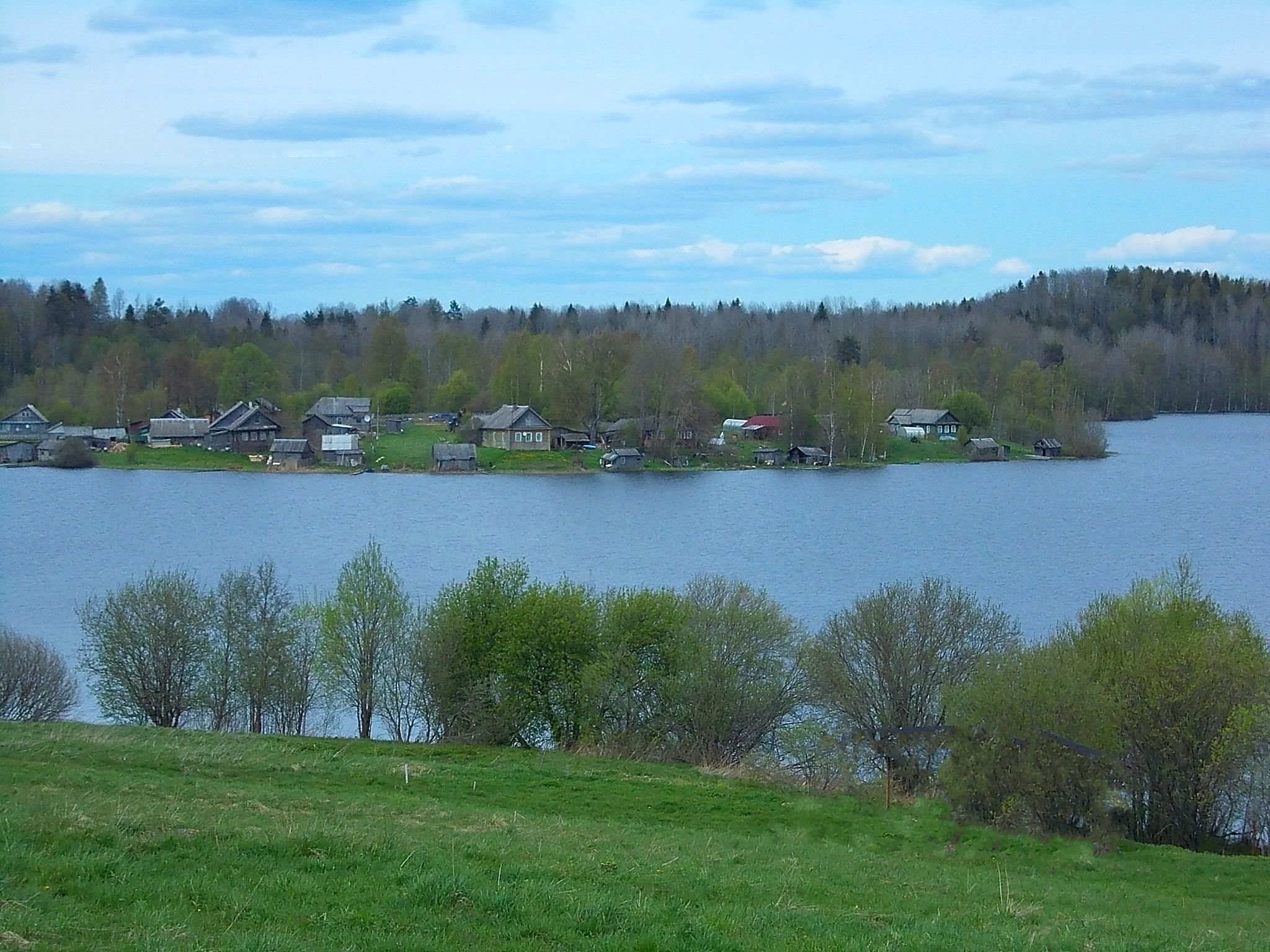 Дома д. Шеменичи на берегу Берецкого озера